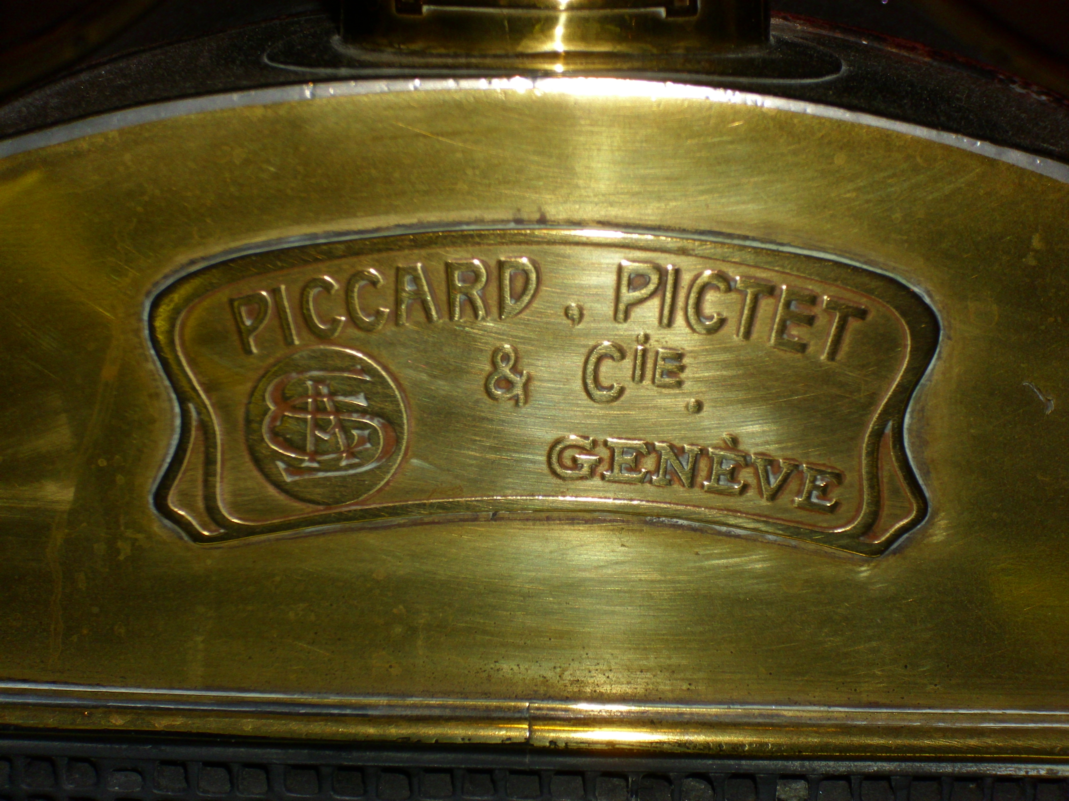 Emblem SAG